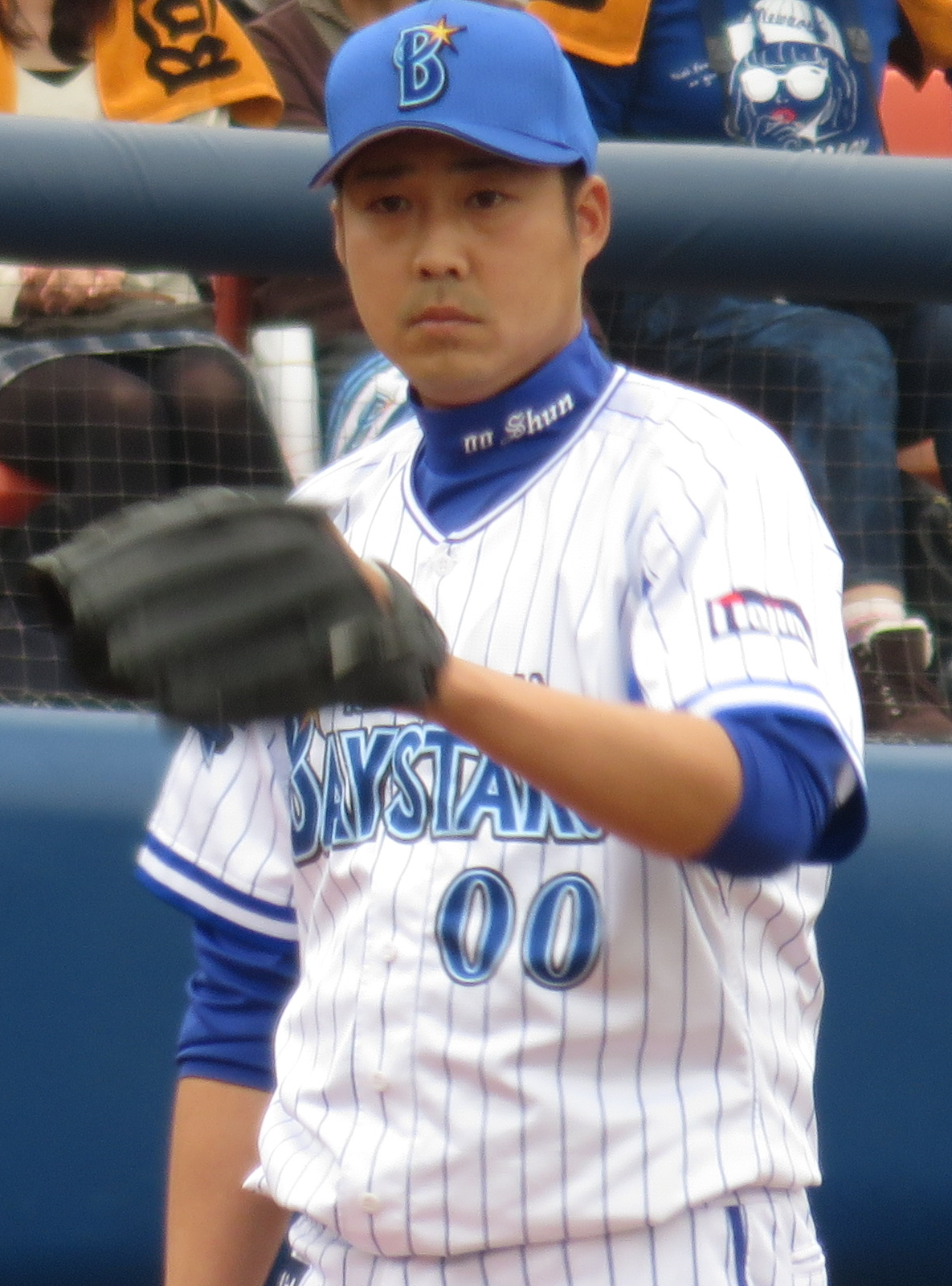 横浜DeNAベイスターズに所属する東野峻投手。2015年3月19日に横浜スタジアムで撮影。